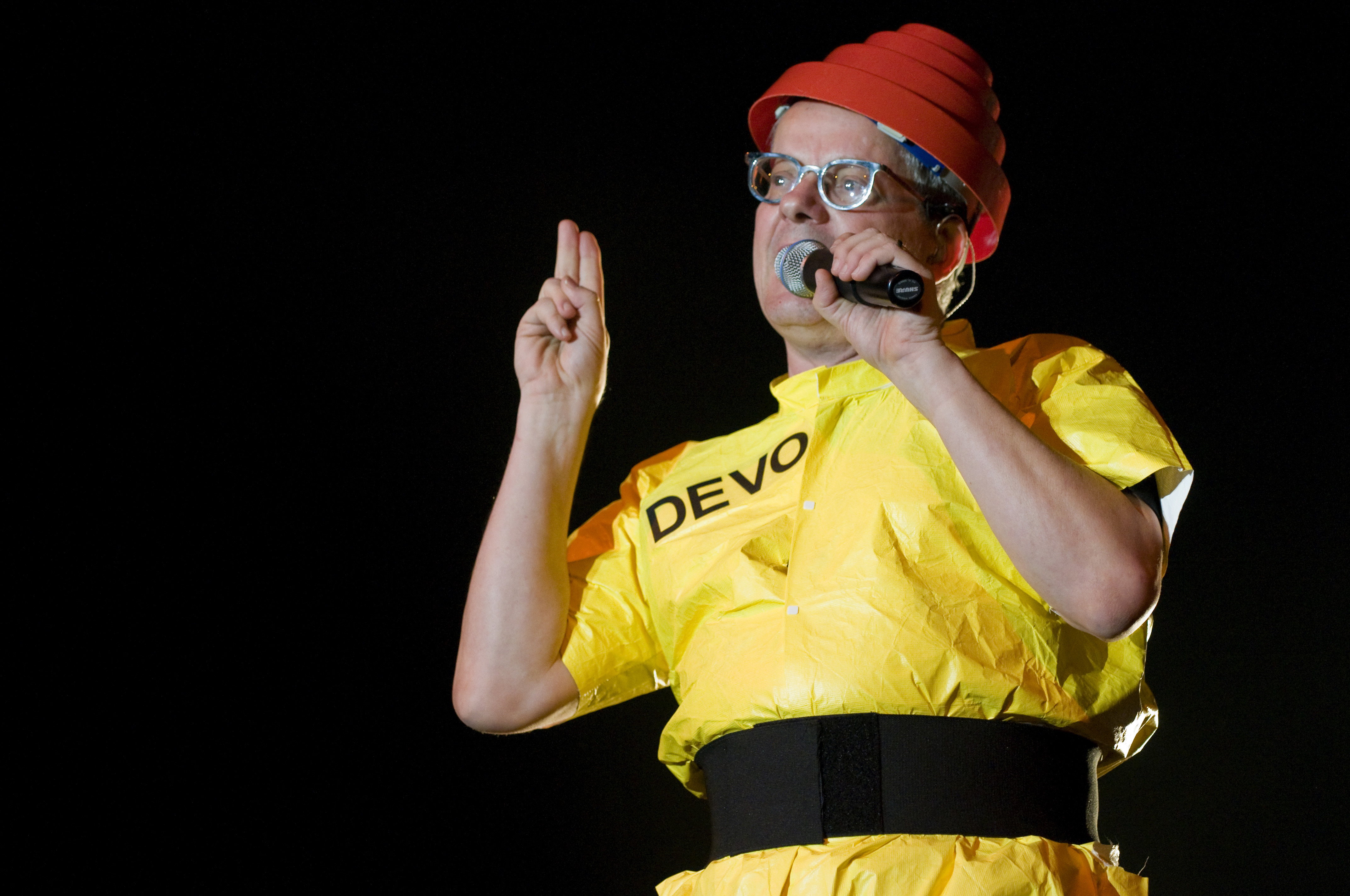 Devo - American New Wave band